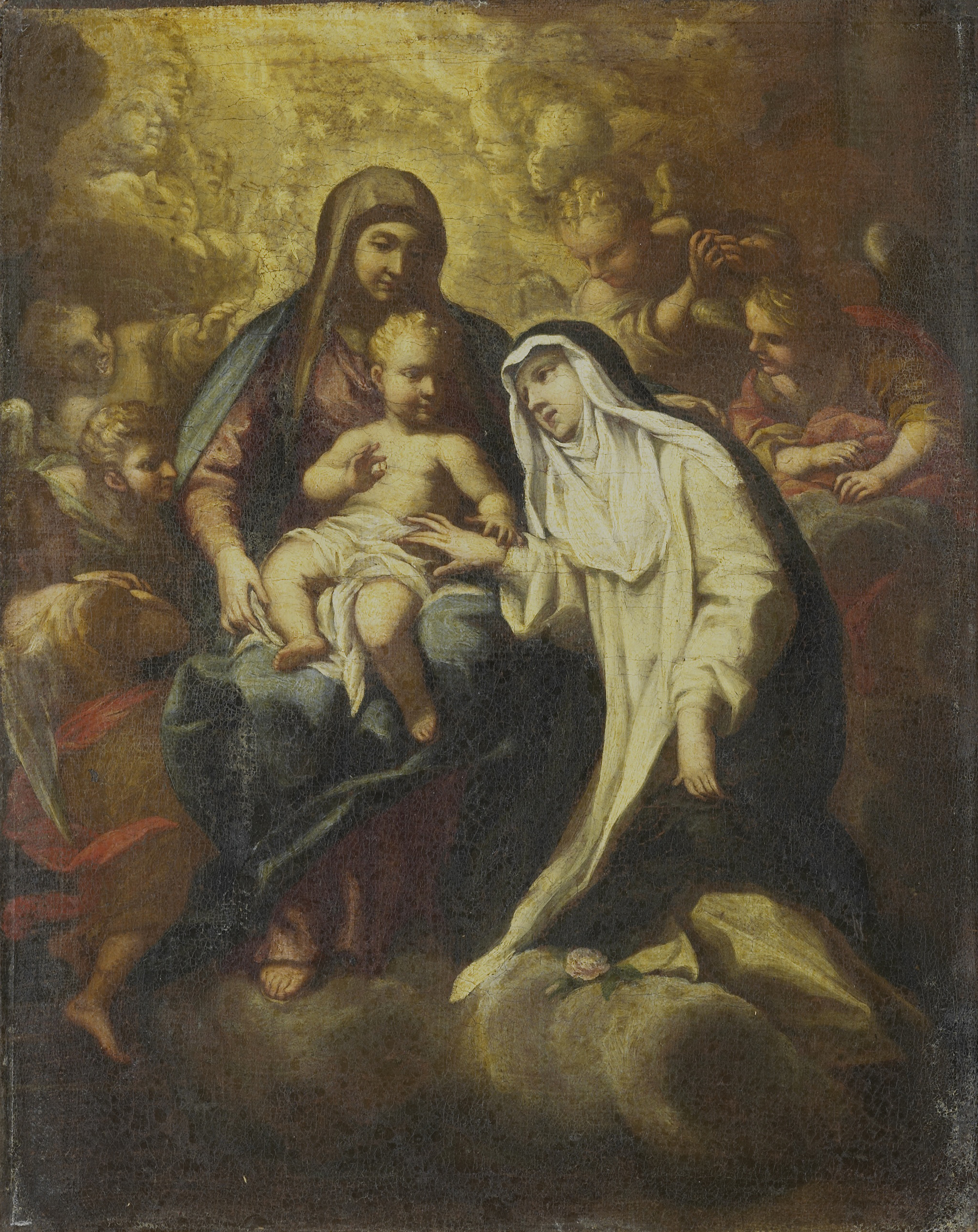 Het mystieke huwelijk van de heilige Rosa van Lima, vroeger geïnterpreteerd als het mystieke huwelijk van de heilige Catharina. De heilige tussen engelen in de hemel bij Maria met het Christuskind.